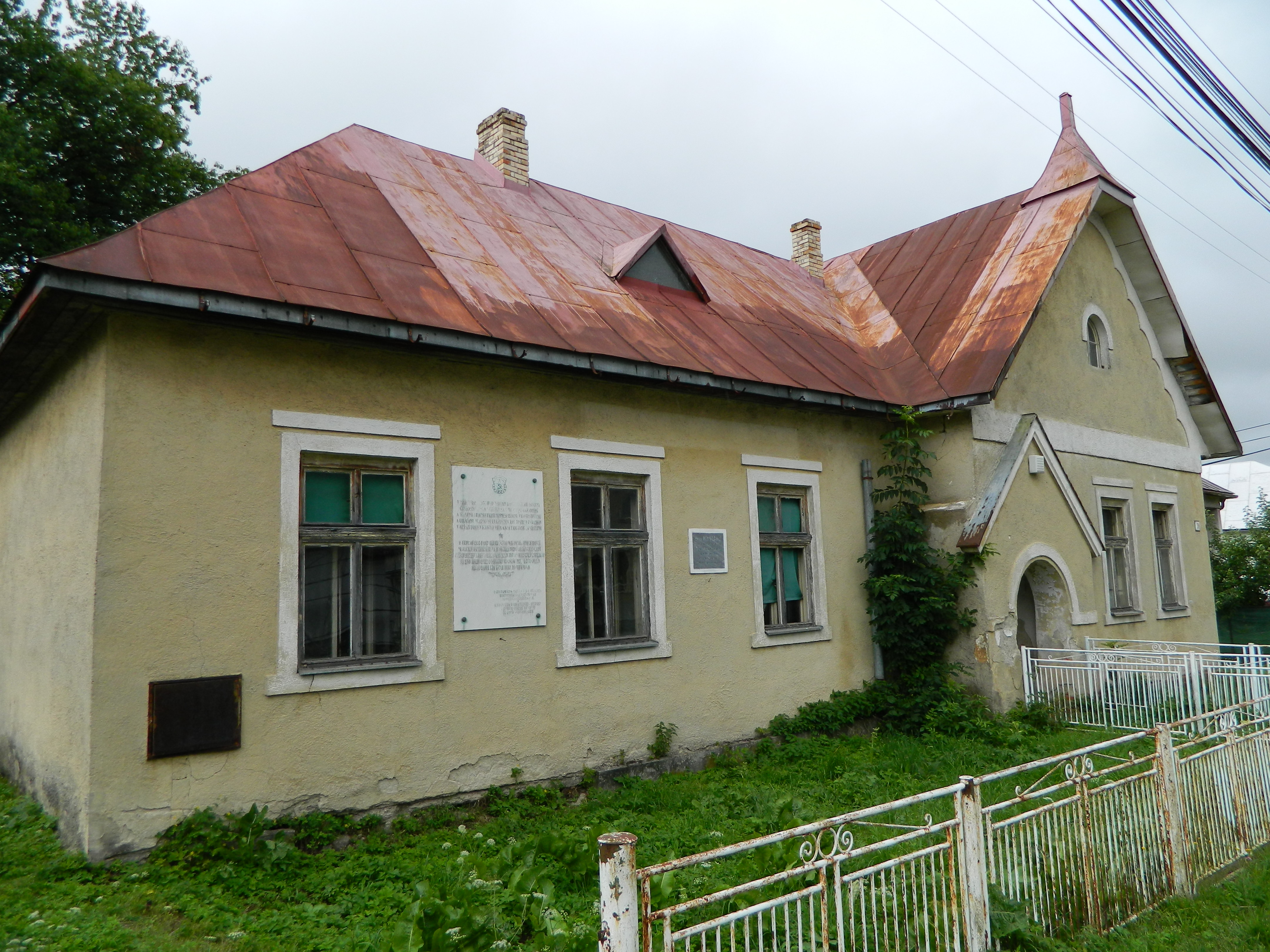 Dom pamätný